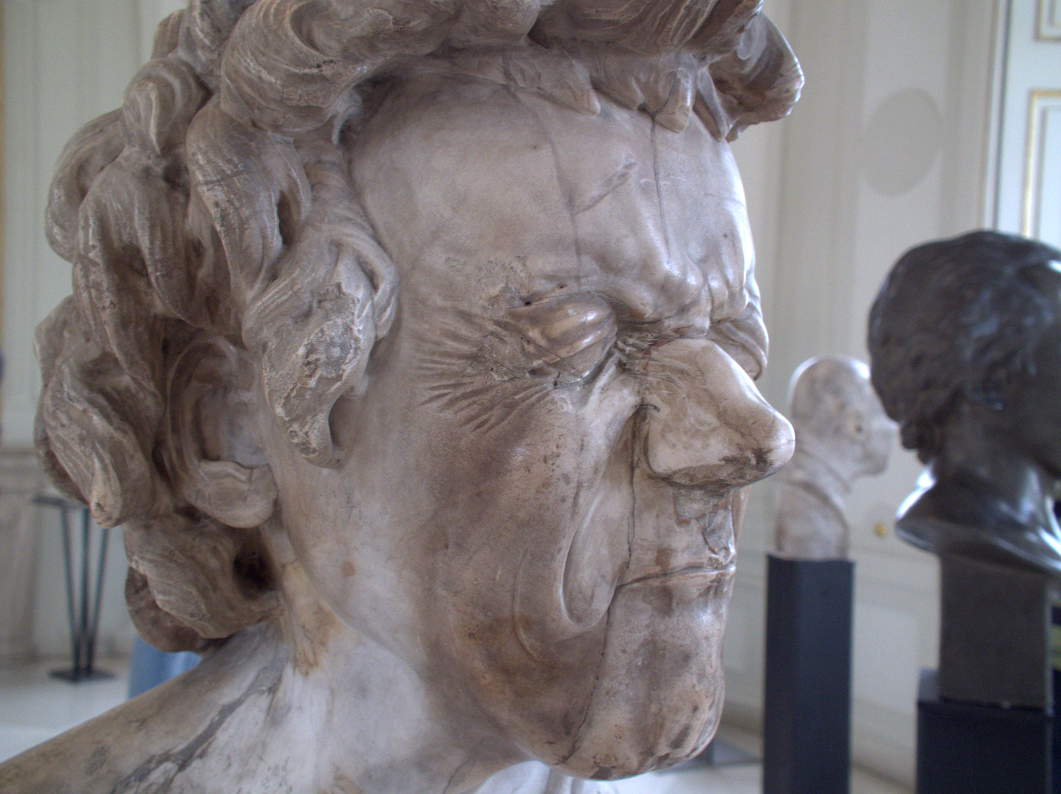 "Charakterkopf" des Bildhauers Franz Xaver Messerschmidt (1736-1783) im Oberen Belvedere zu Wien